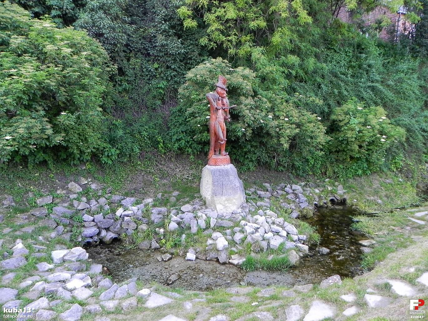 Drewniana rzeźba słynnego chrząszcza, przy źródełku naprzeciwko młyna zbożowego przy ulicy Klukowskiego.